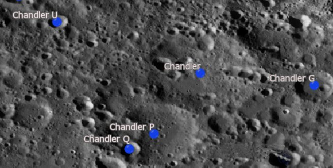 Cráter Chandler (LRO)